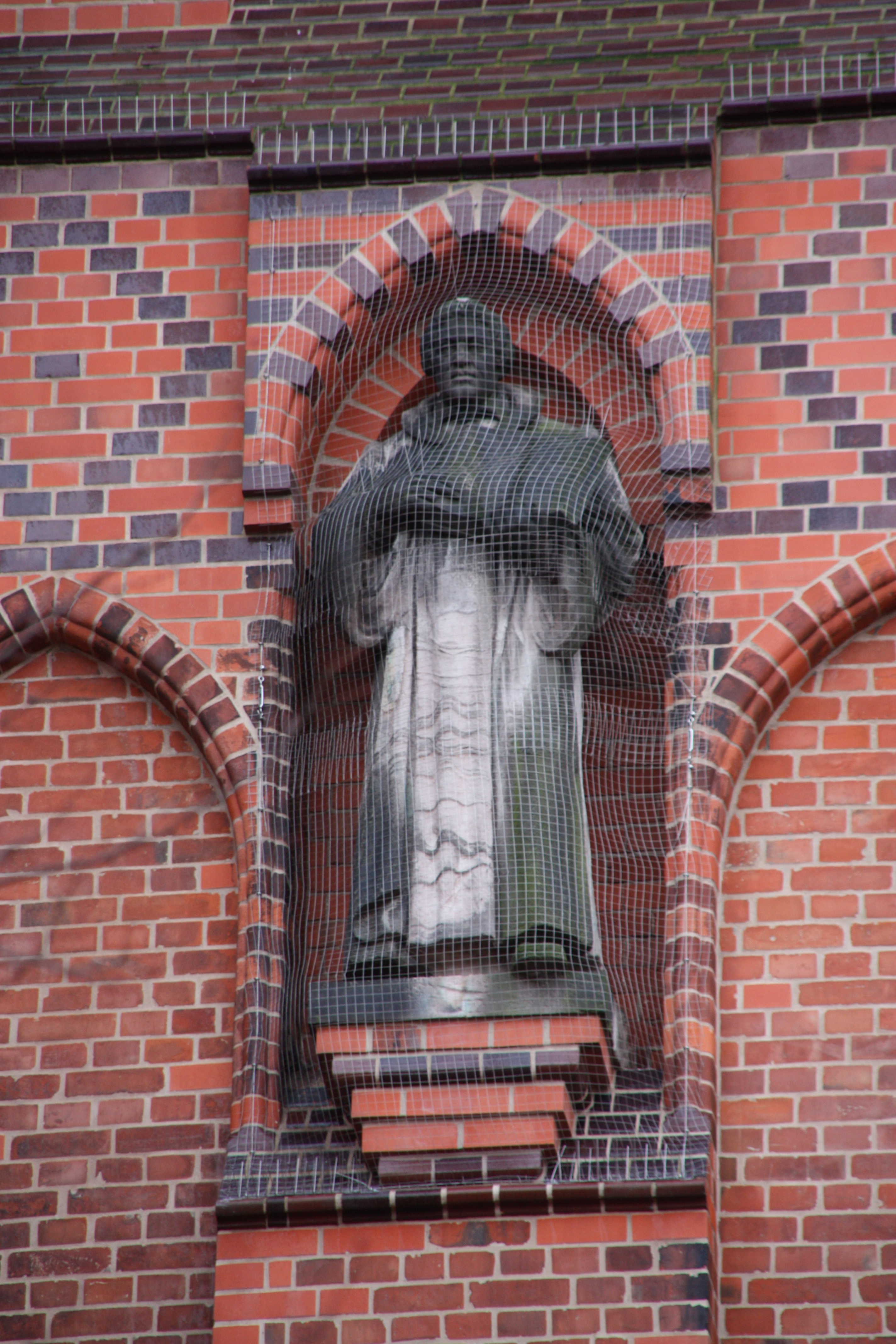 Luther-Figur von Friedrich Meinecke an der St.-Marien-Kirche in Winsen an der Luhe